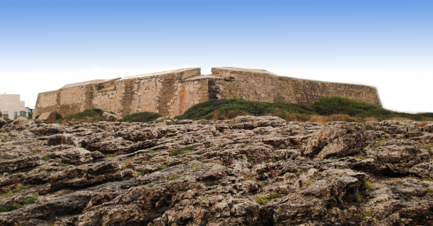 Mallorca_-_Cala_D'Or_-_Es_Forti